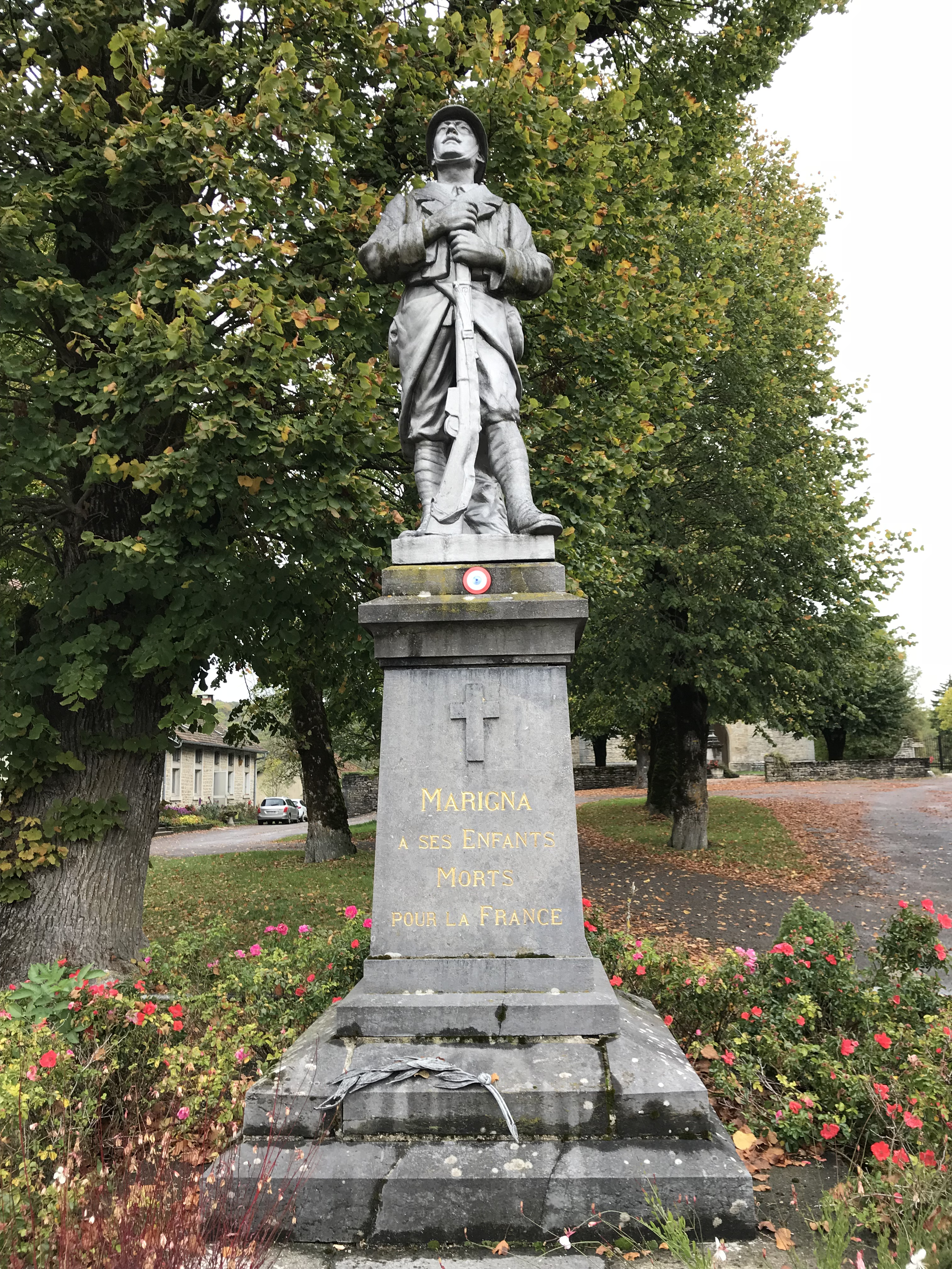 Marigna-sur-Valouse (Jura, France) en octobre 2017.